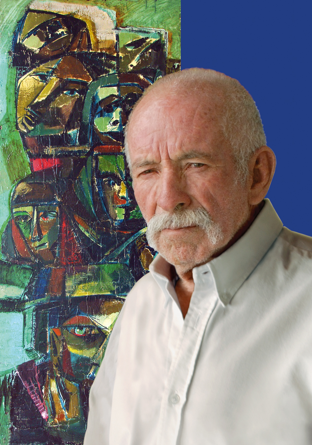 fotomontaje: Erwin López 2007 - Pintura Carnaval 1950 Óleo sobre madera 174 x 69.5 cm.